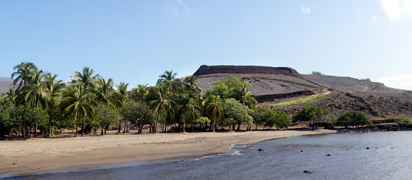 Пуукохола-Хеиау